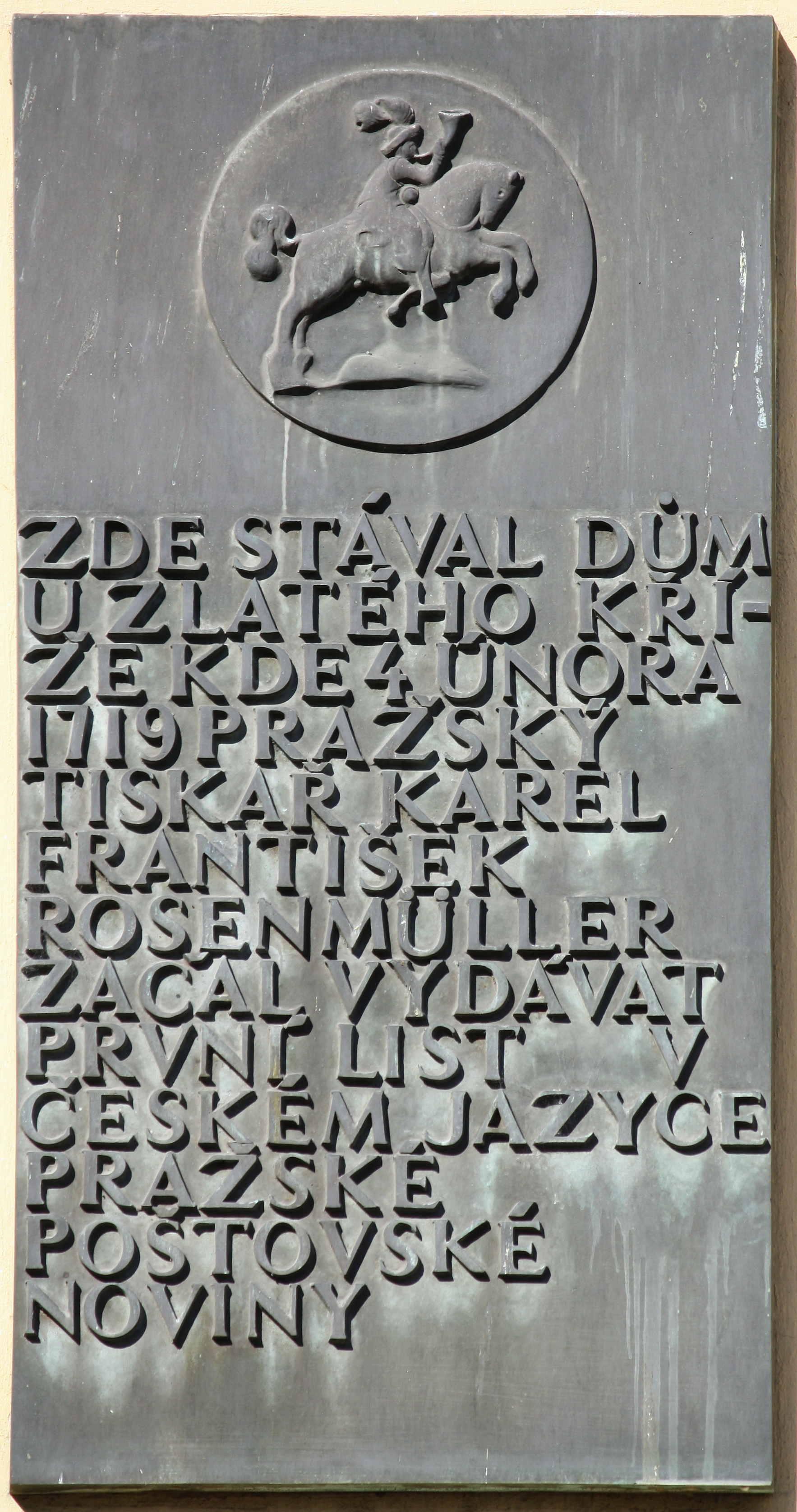 Pamětní deska - Pražské poštovské noviny, Praha 1-Staré Město, Uhelný trh 526/6 (uprostřed mezi okny v úrovni 1. patra).